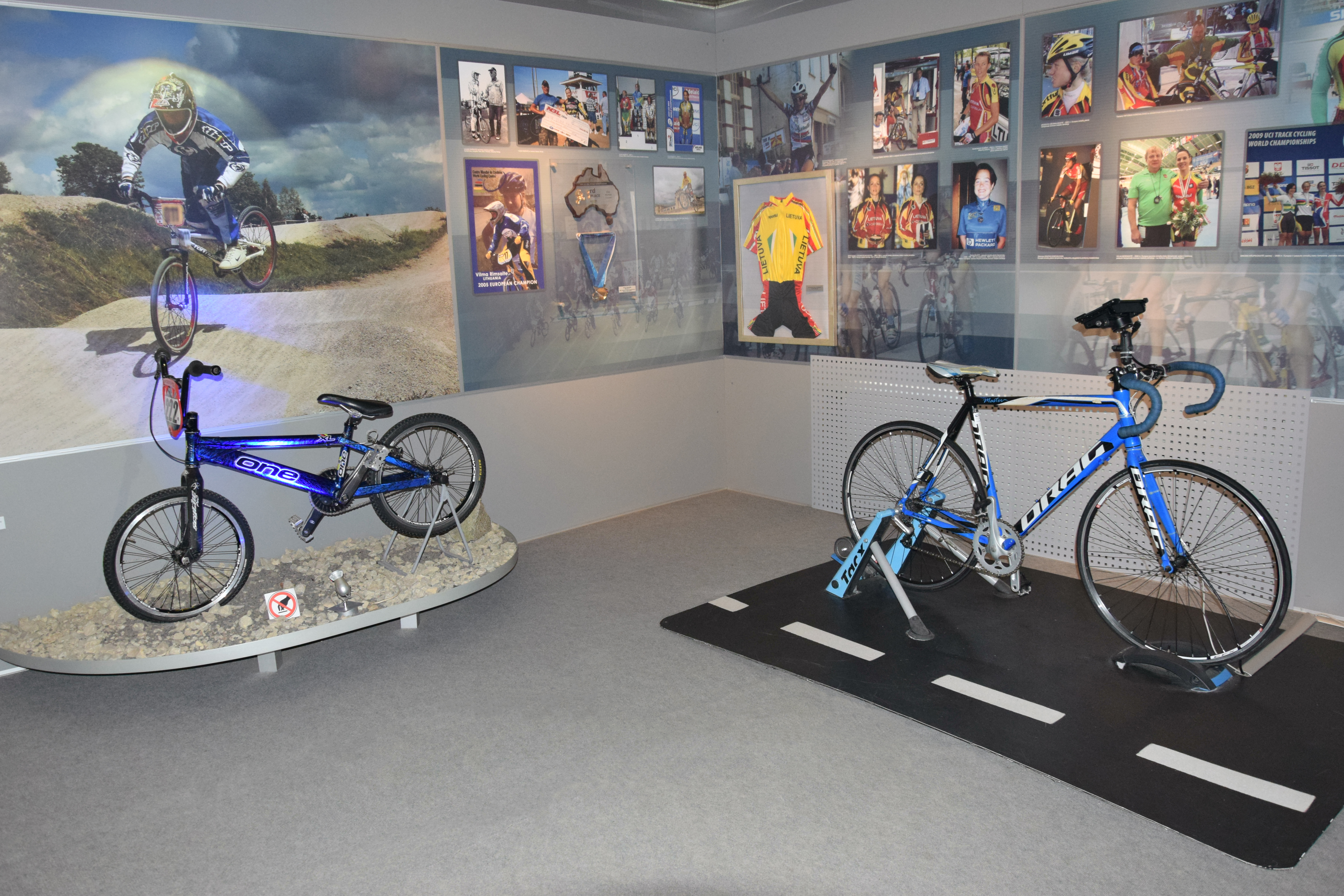 Trečiojo aukšto ekspozicijoje pristatomas interaktyvus stendas su virtualiomis plento dviračių trasomis. Lankytojui reikia tik sėsti ant dviračio, pasirinkti maršrutą, minti pedalus ir pasinerti į virtualios trasos pojūčius. Taip kiekvienas gali išbandyti plento dviračių sportą.